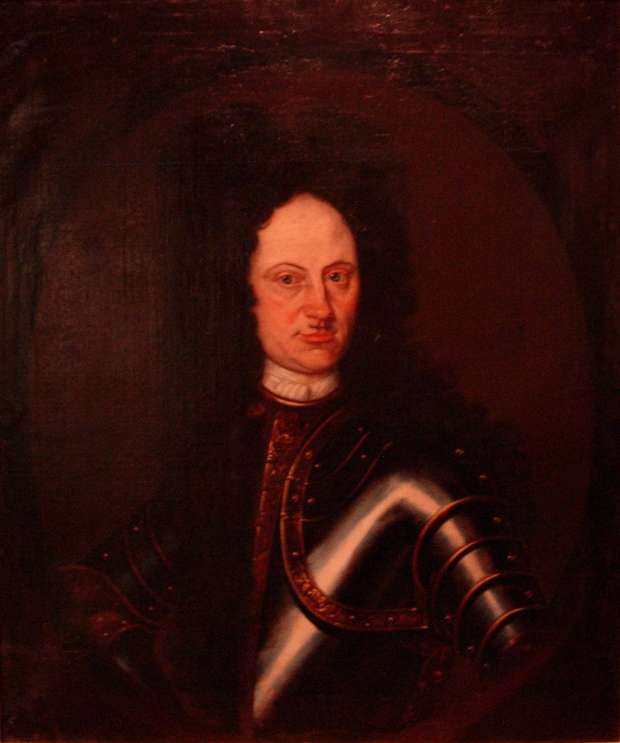 Jürgen Lode (1661-1730). Muotokuva Helsingin Kaupunginmuseosta. Aikalaisteos.